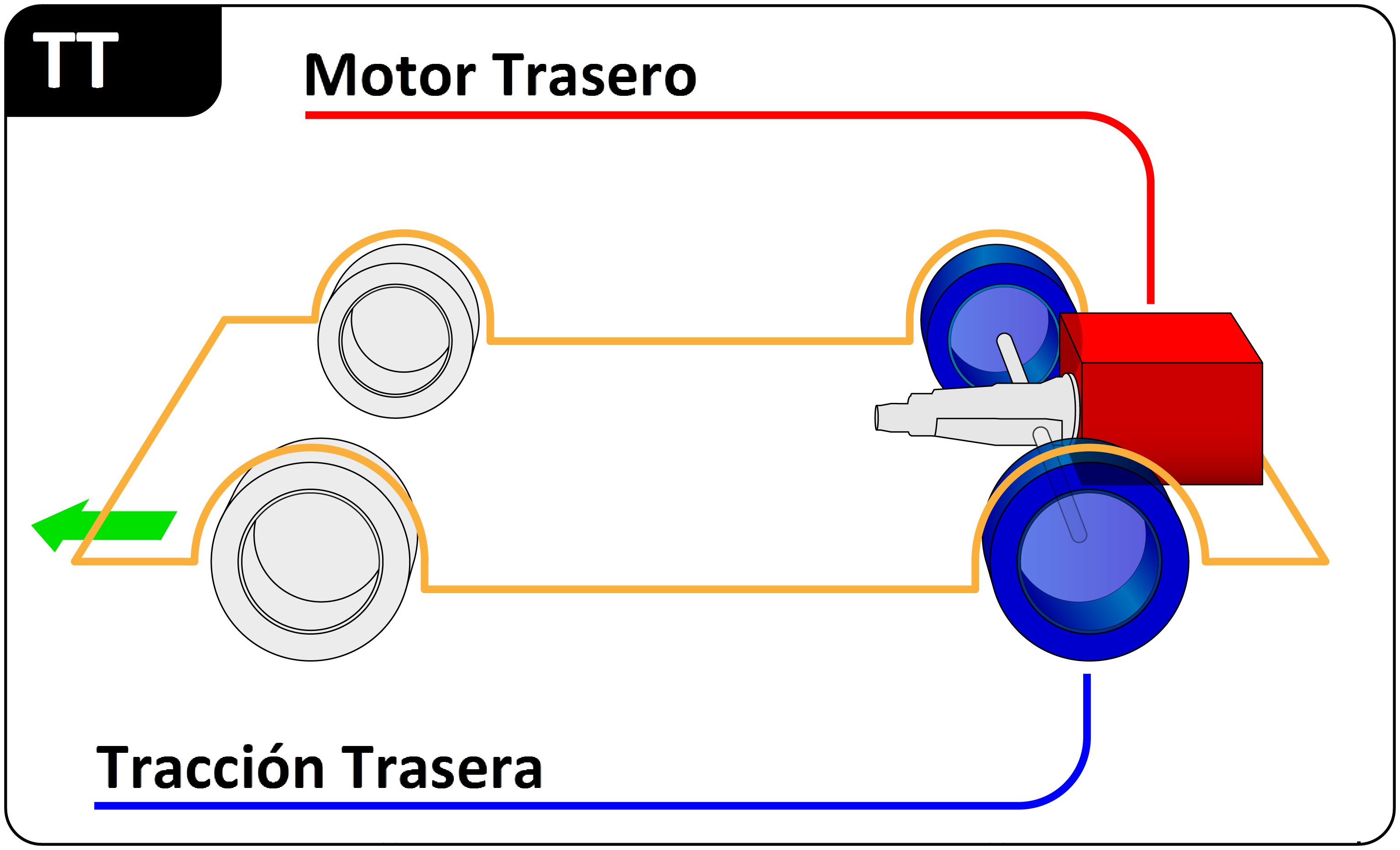 Diagrama de un vehículo con motor trasero y tracción trasera (TT)